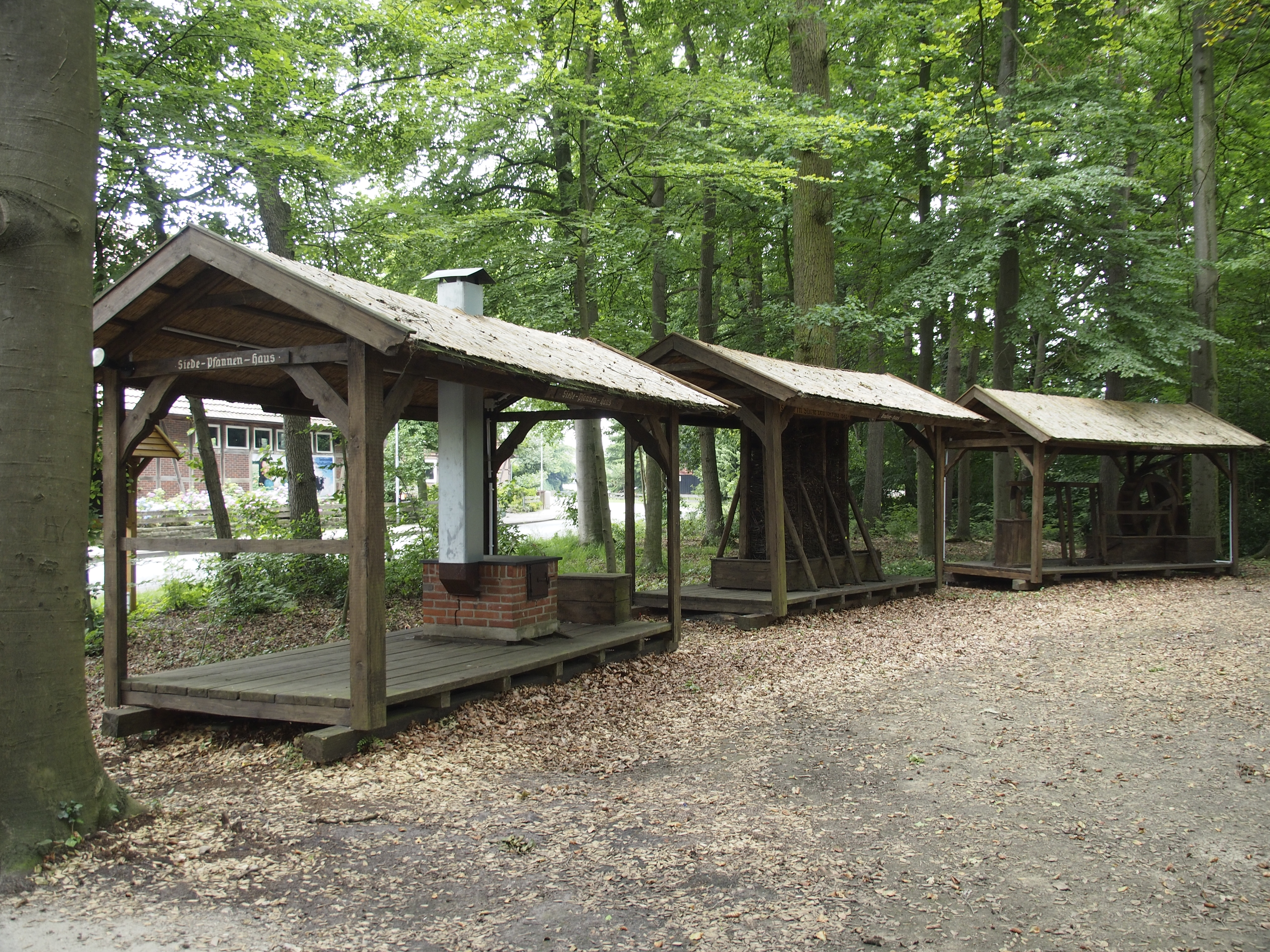 Salinen-Ausstellung (Salinenmodell) in Sülze